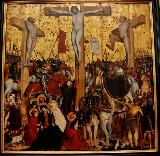 Conrad Laib - Crocifissione 1457 olio su tavola 269x275 cm. Duomo di Graz (Austria)